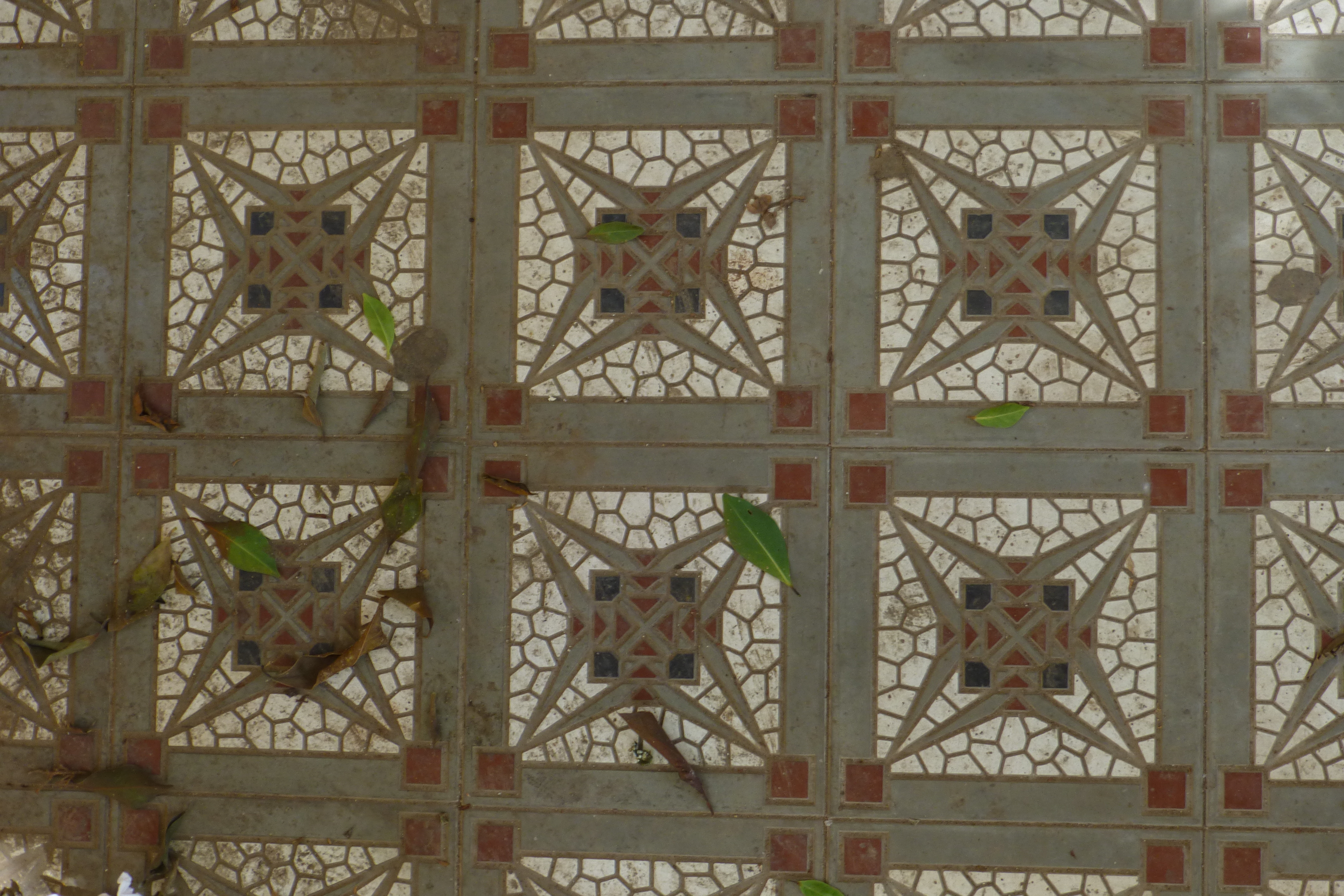 רח' מונטיפיורי 3, פתח תקווה